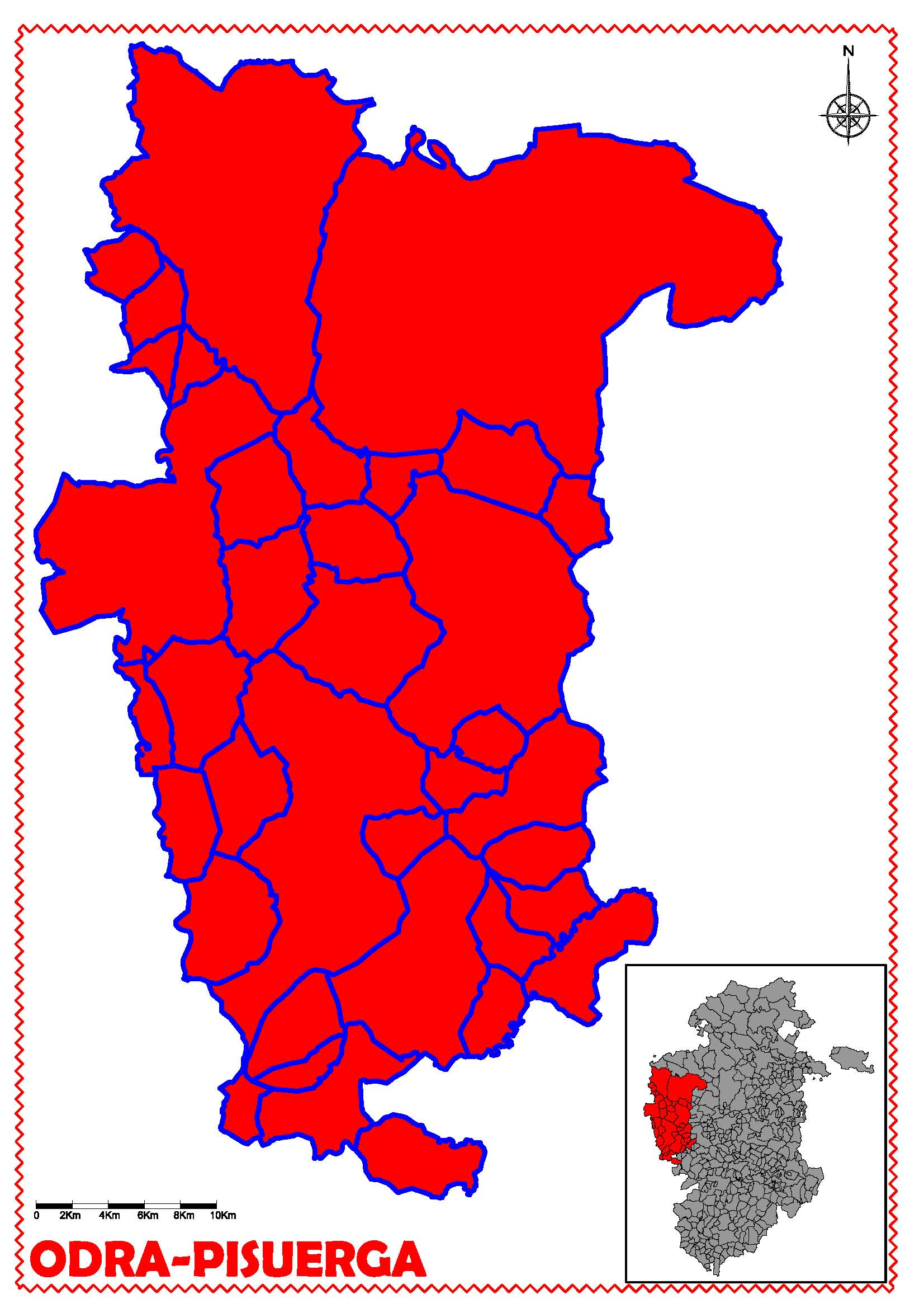 Ubicaión de la comarca "Odra-Pisuerga" en la provincia de Burgos (España)